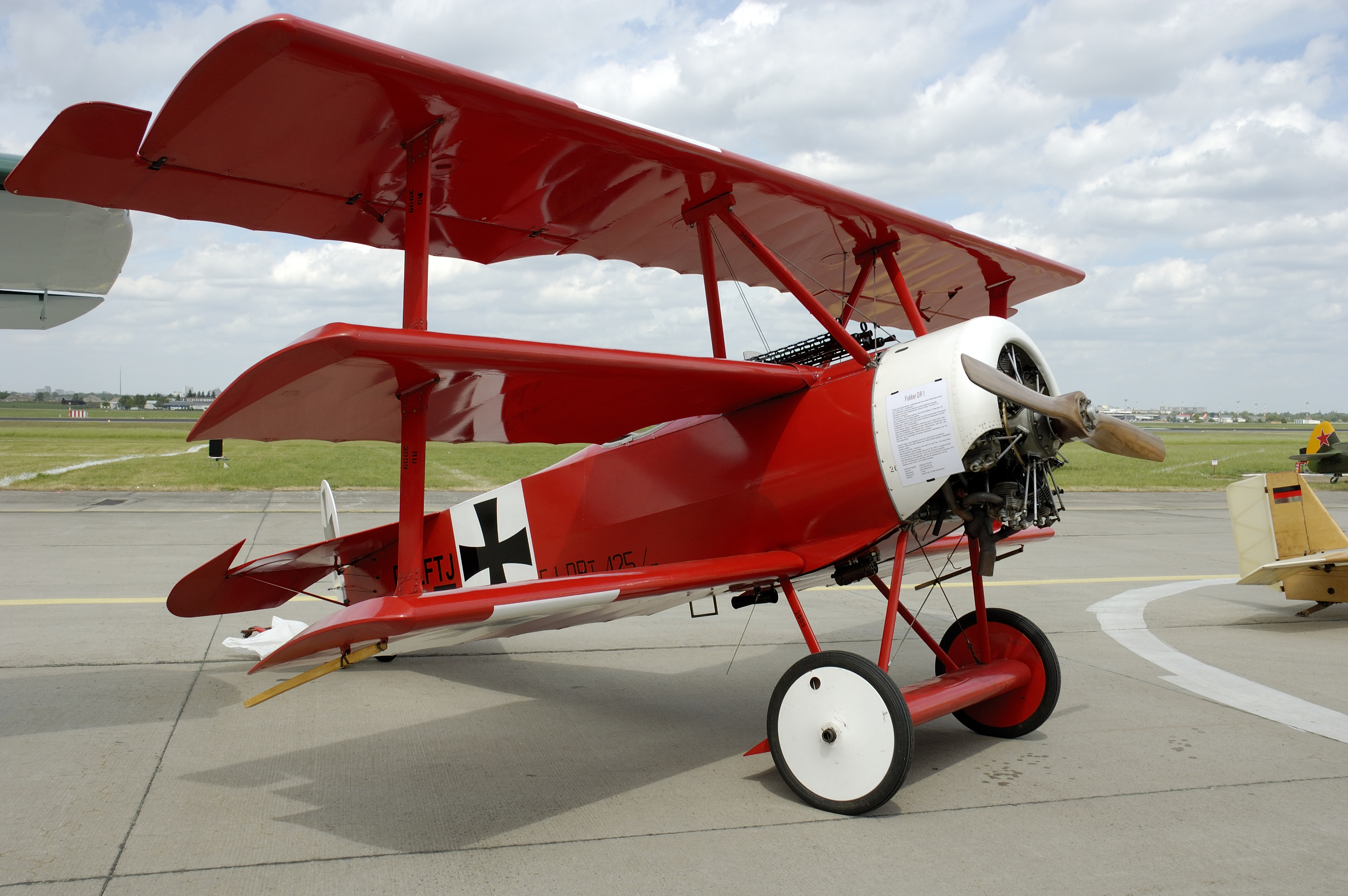 Nachbau der Fokker DR1 auf der ILA 2006. Manfred von Richthofen, genannt "Der Rote Baron", flog dieses Modell im 1. Weltkrieg.